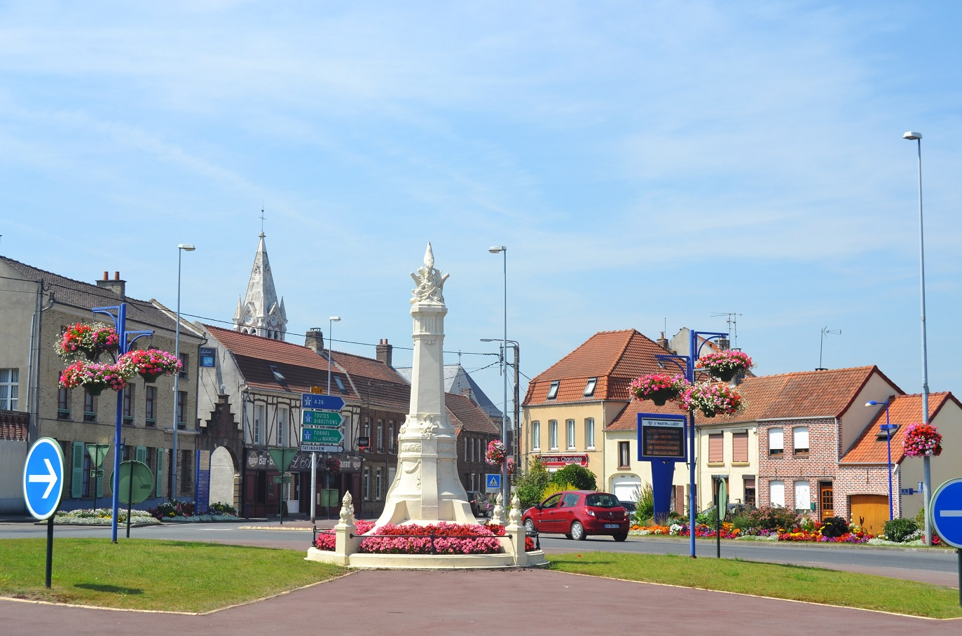 Centre Ville